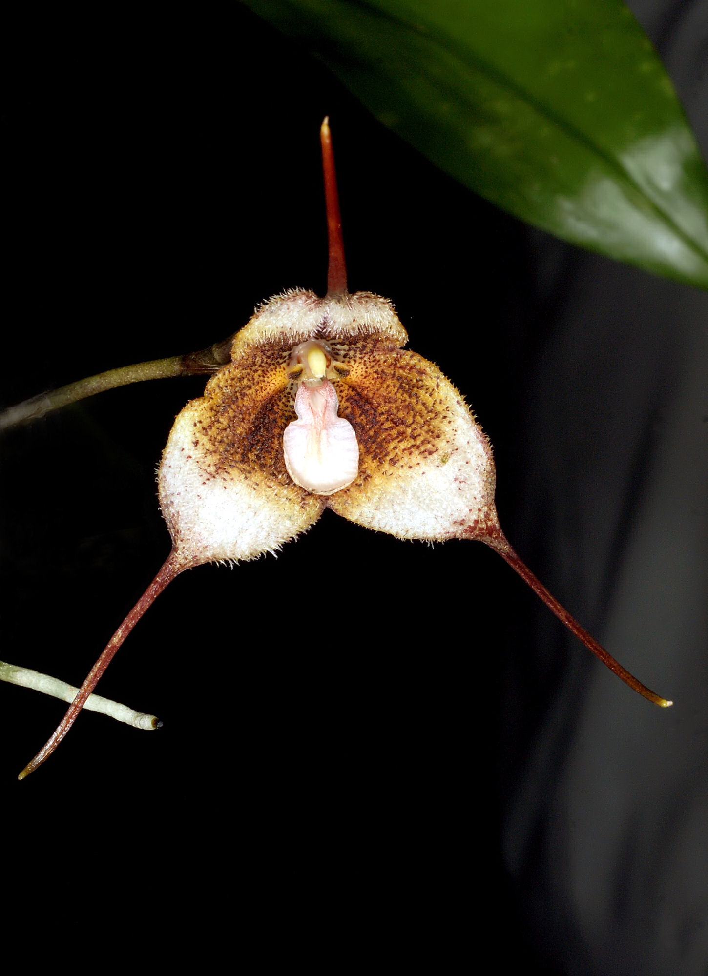 Dracula diana